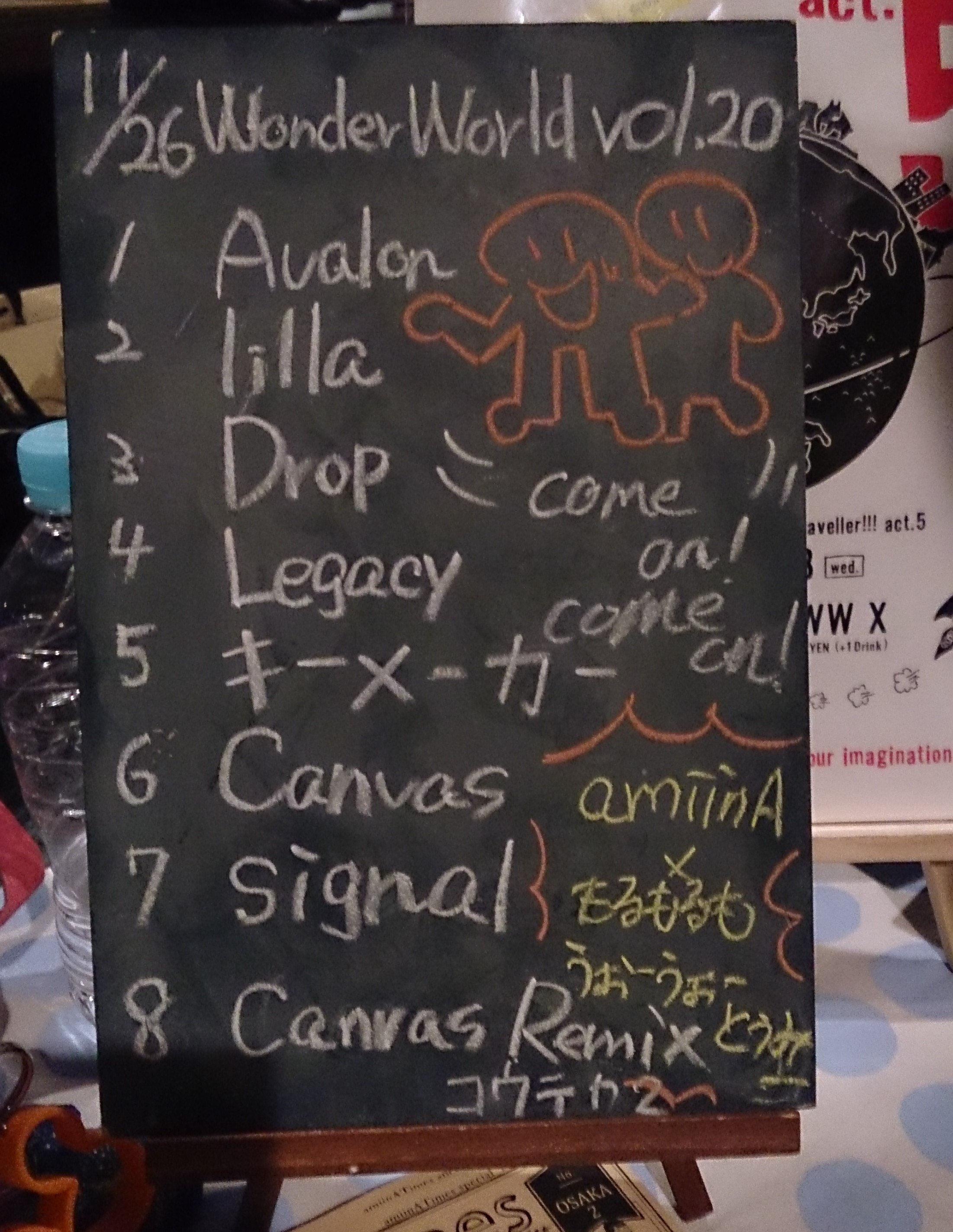 amiinAセトリボード(20161126(2))